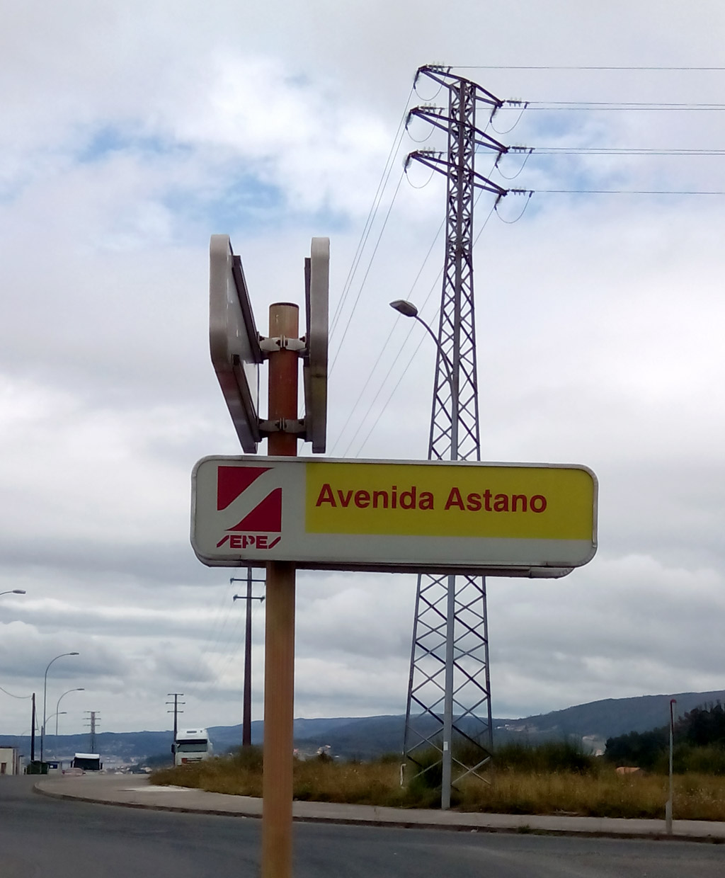 Praca da Avenida ASTANO en Vilar do Colo, Fene